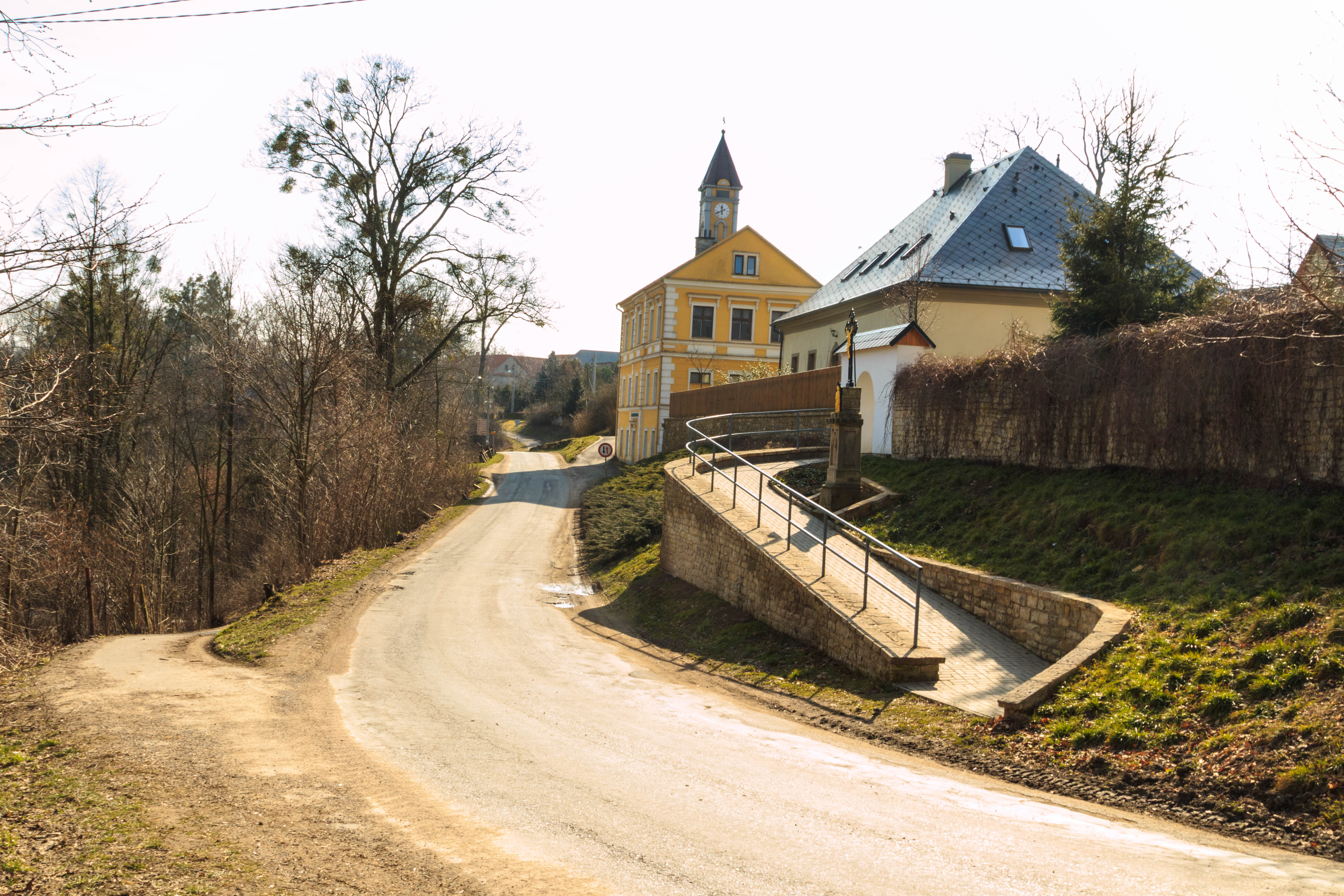 Project: Chráněná území. Trstěnice pod kostelem